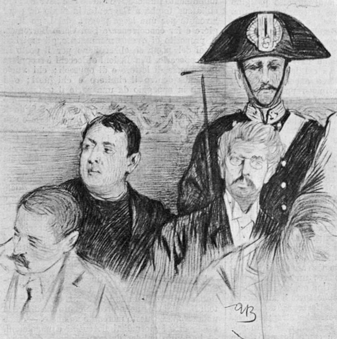 Don Albertario e Romussi in tribunale durante il processo del 1898